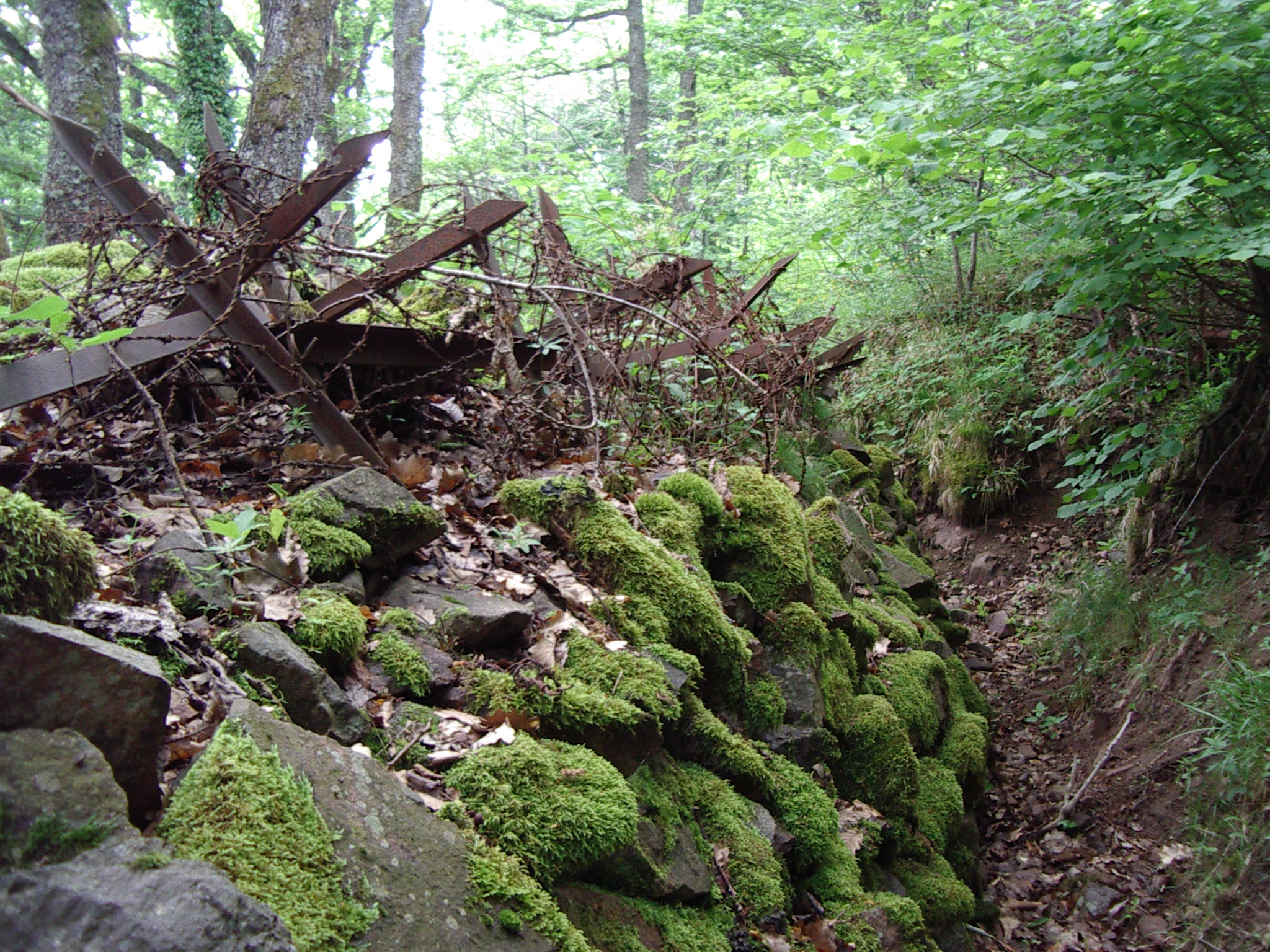 Vestiges d'une tranchée de la Première Guerre mondiale entre le Hirtzenstein et le Hartmannswillerkopf